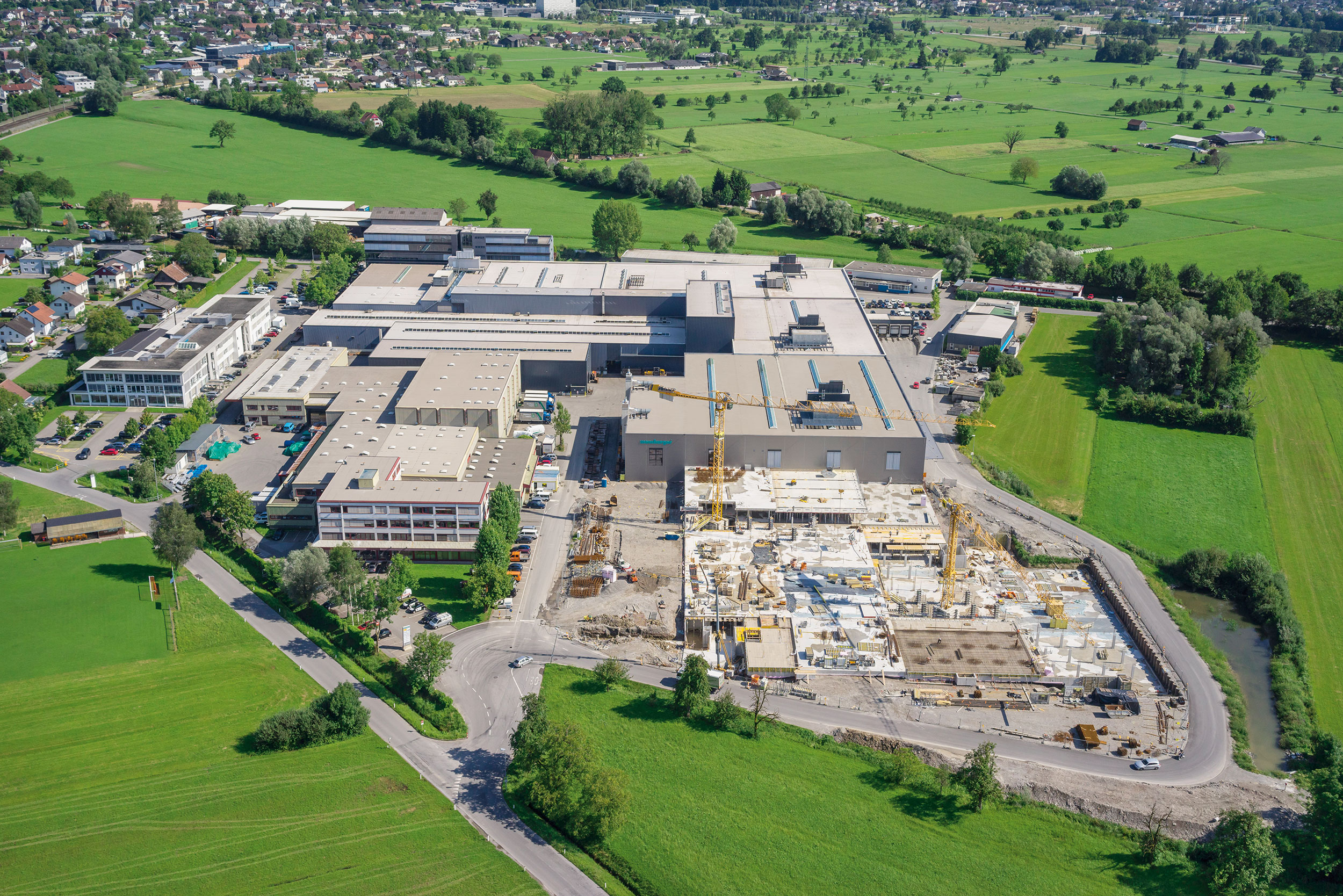 Firmenhauptsitz Meusburger Georg GmbH & Co KG in Wolfurt